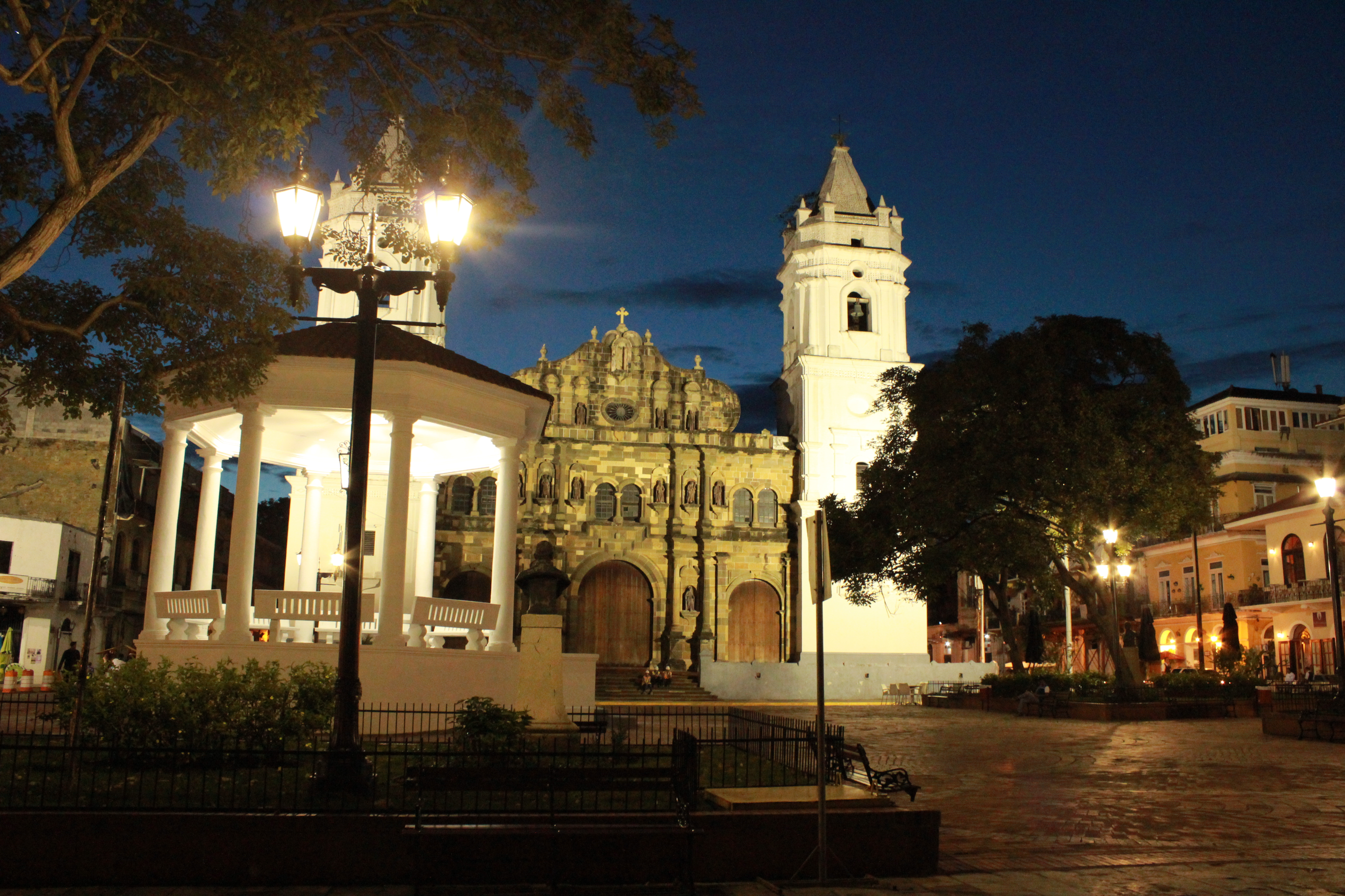 Esta es una fotografia de la plaza de la catedral. Monumento nacional de Panama